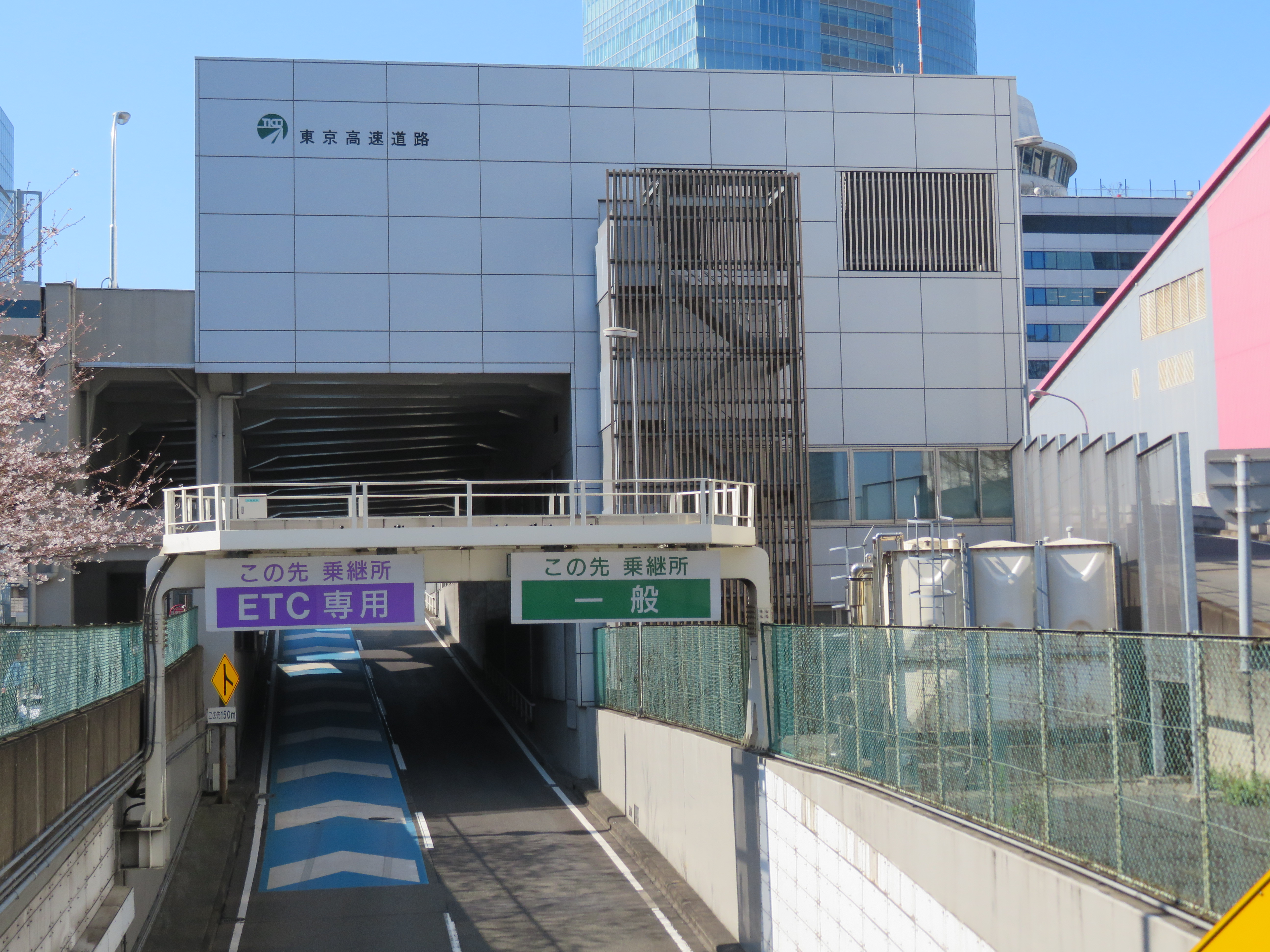 東京高速道路株式会社の本社が所在する東京高速道路北有楽ビル